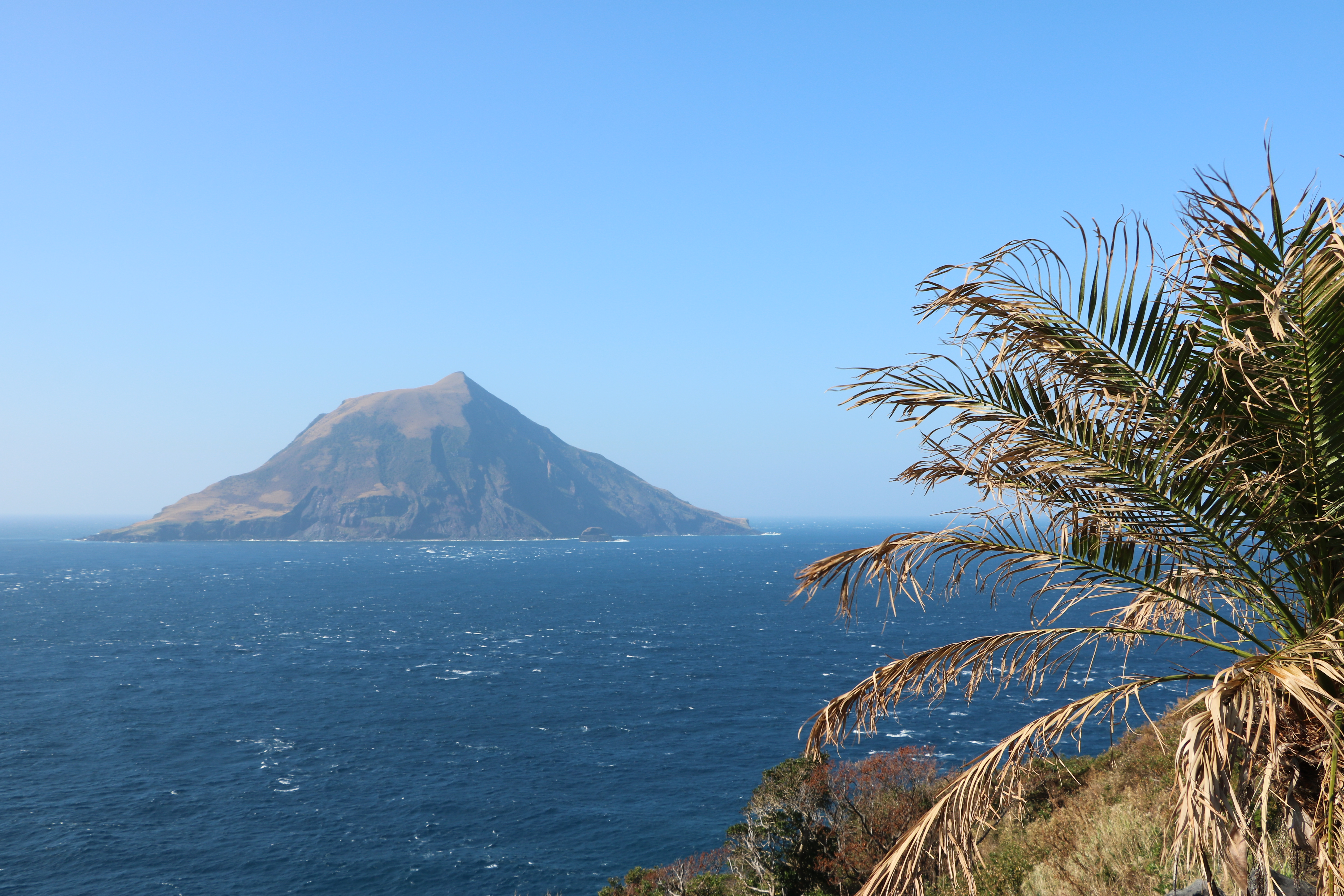 八丈島西岸から遠望した八丈小島。